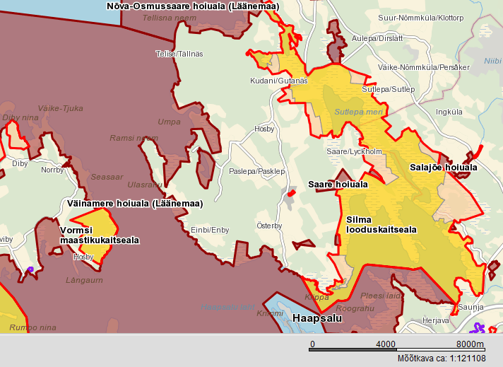 Silma LKA Maa-ameti kaardil.